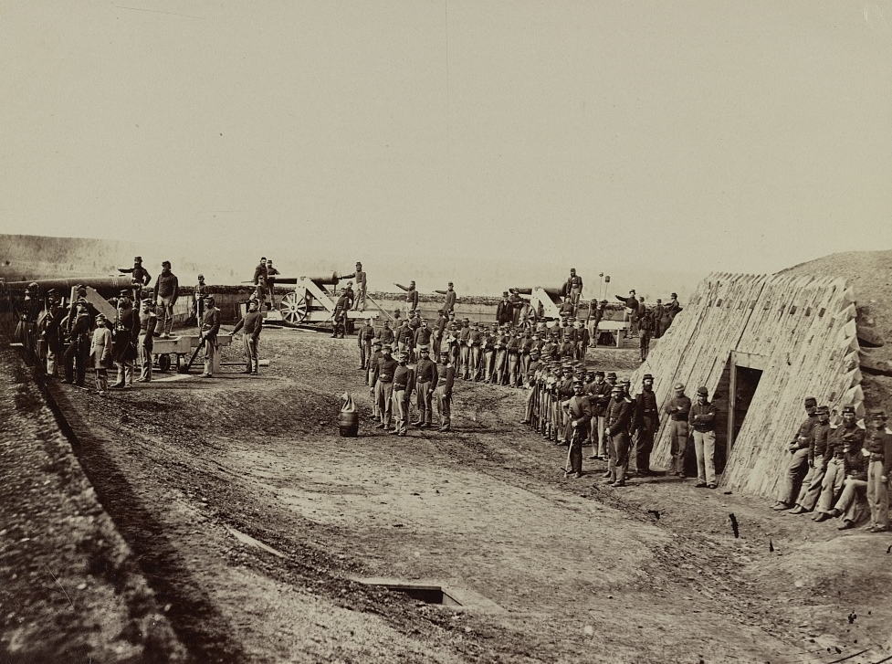 Fort Totten